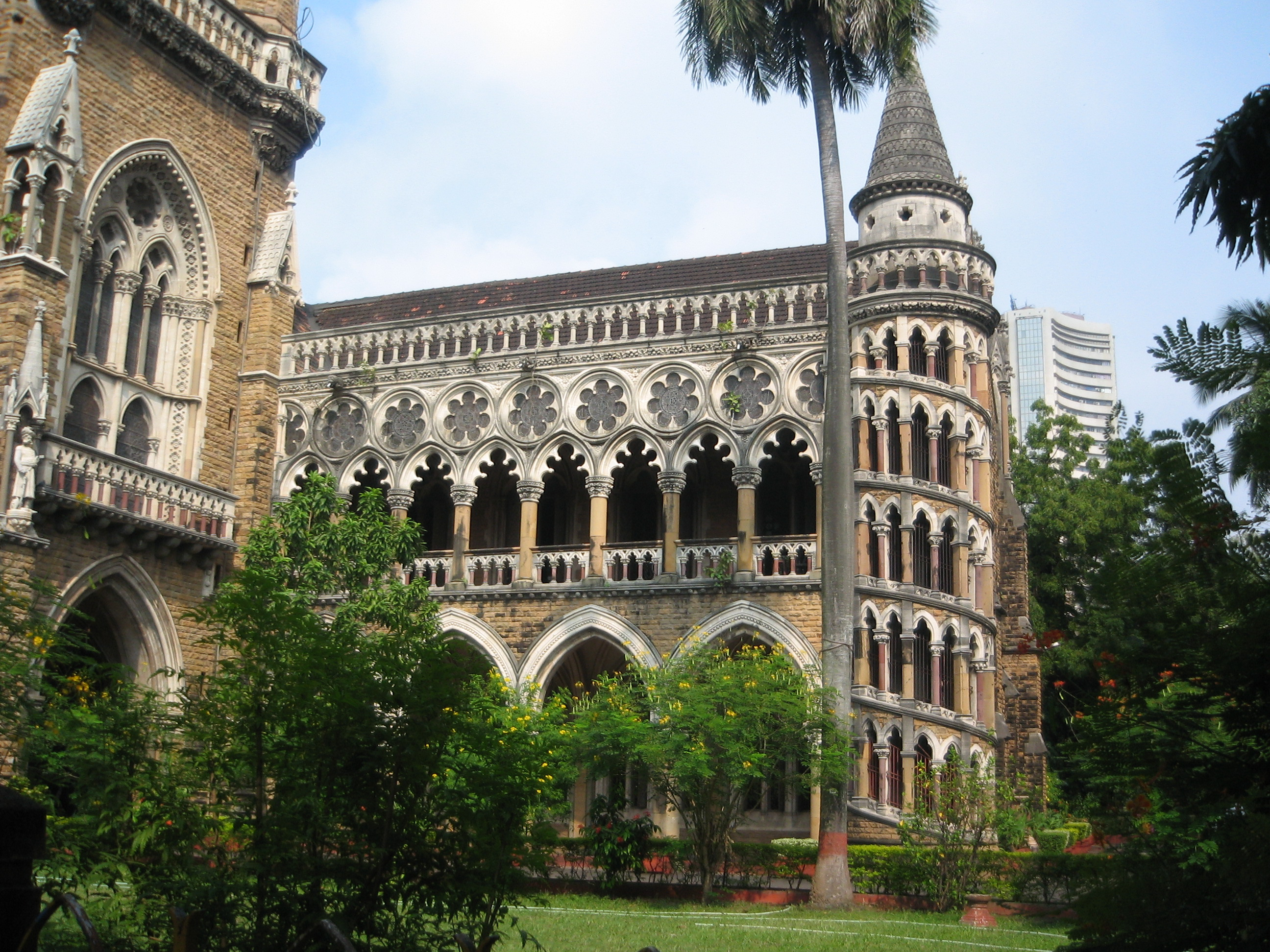 In Mumbai.